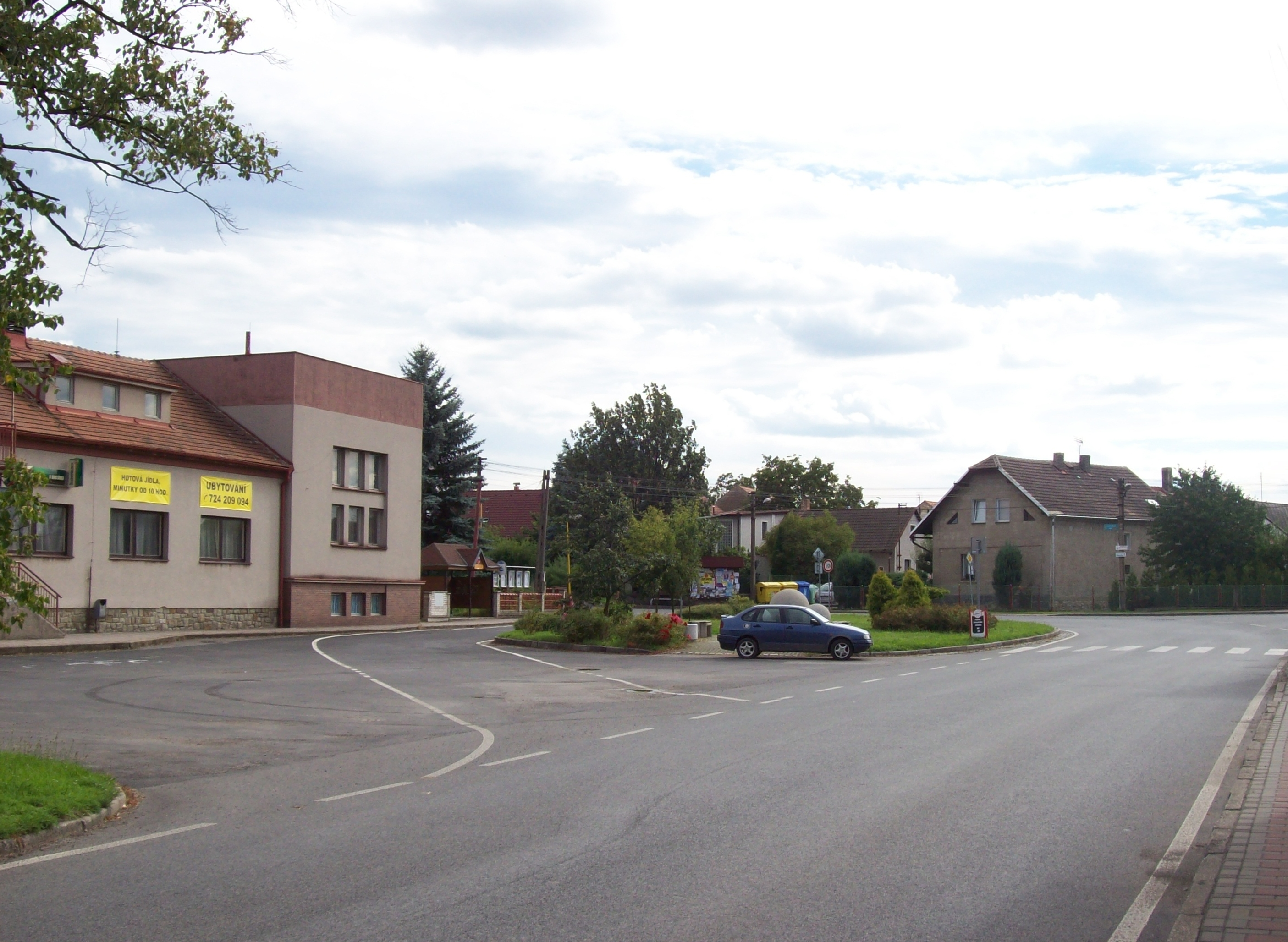 Tlustice